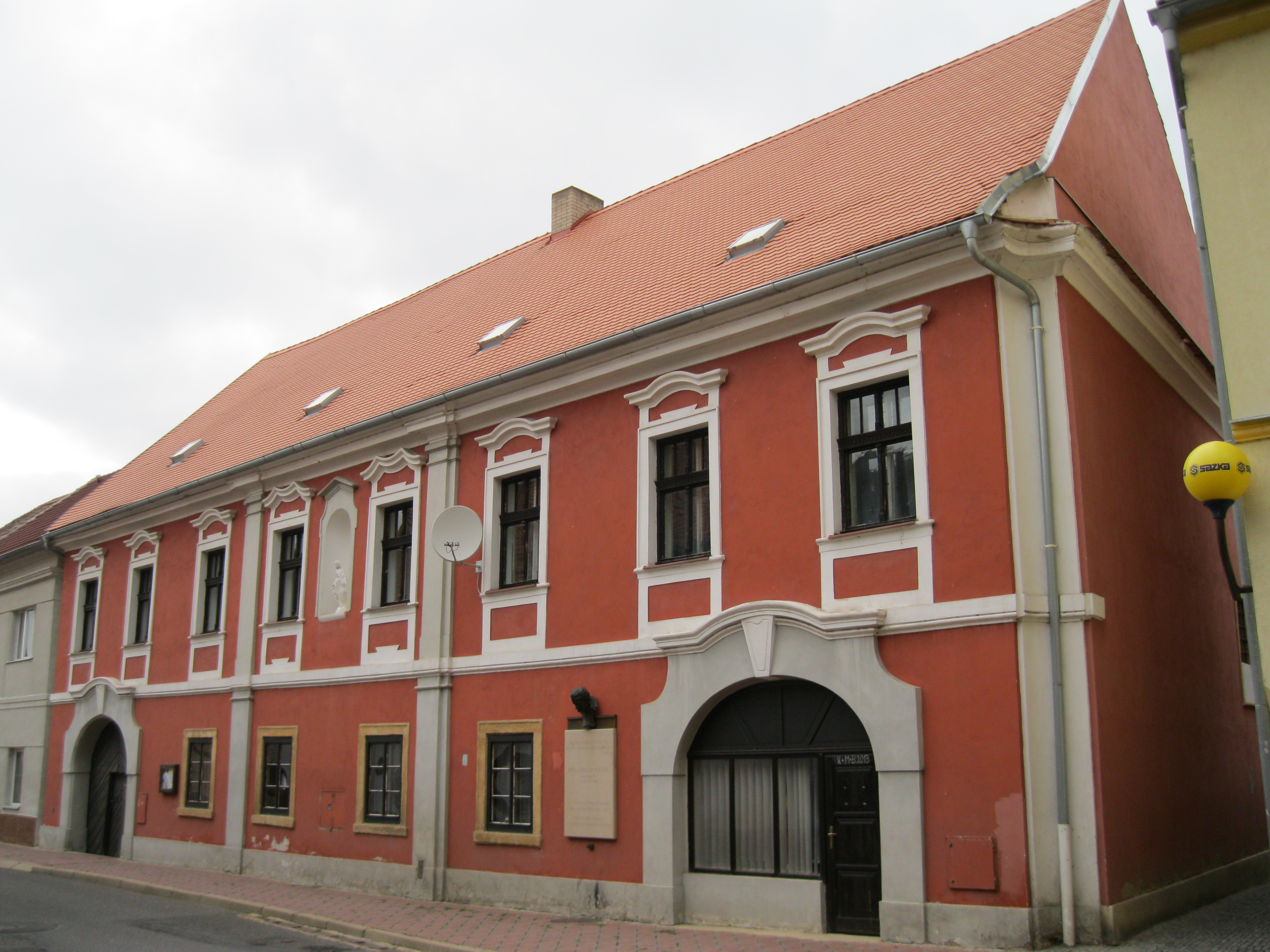 Fara (Třebenice), Třebenice 68